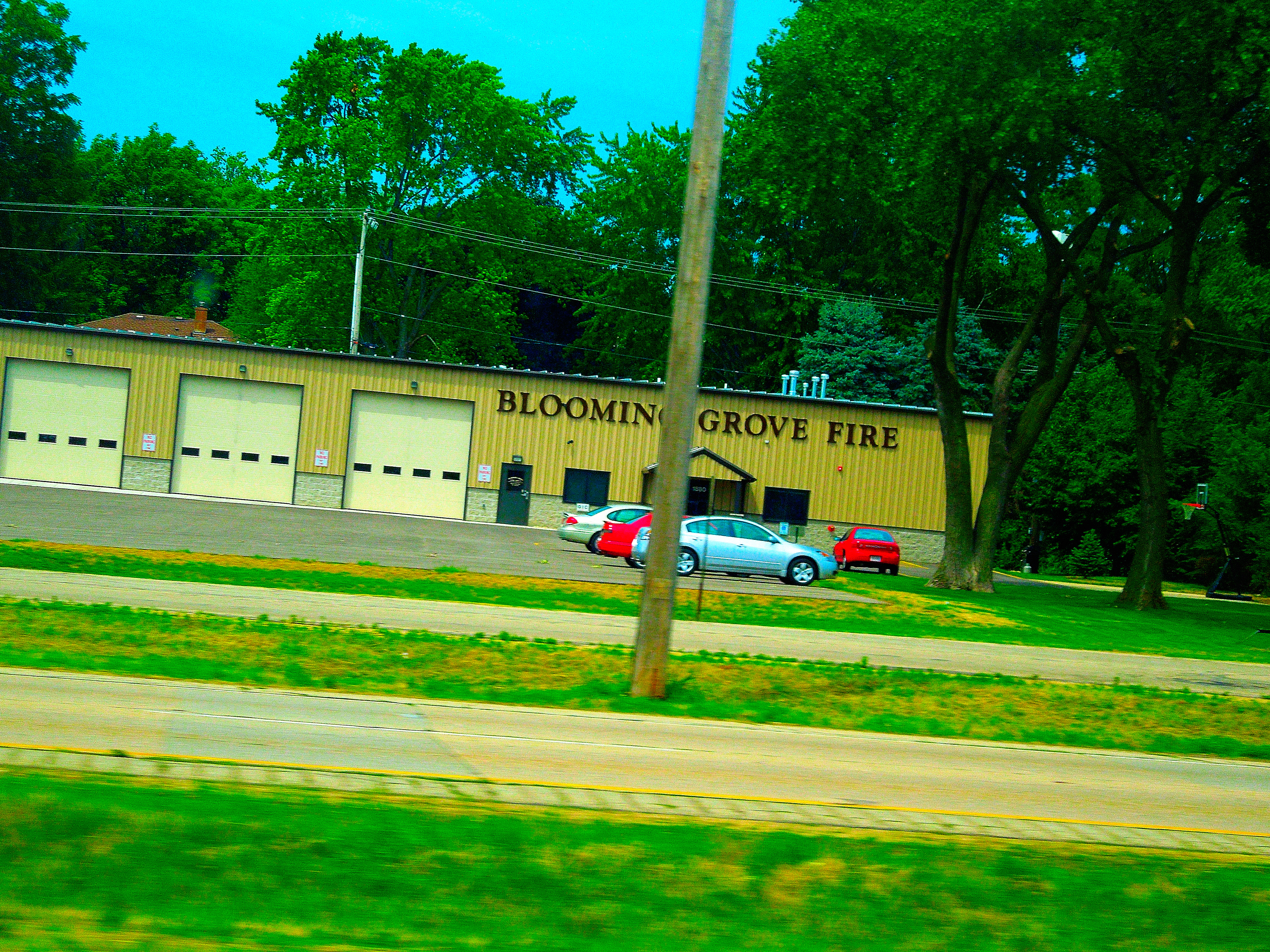 Blooming Grove Fire Department